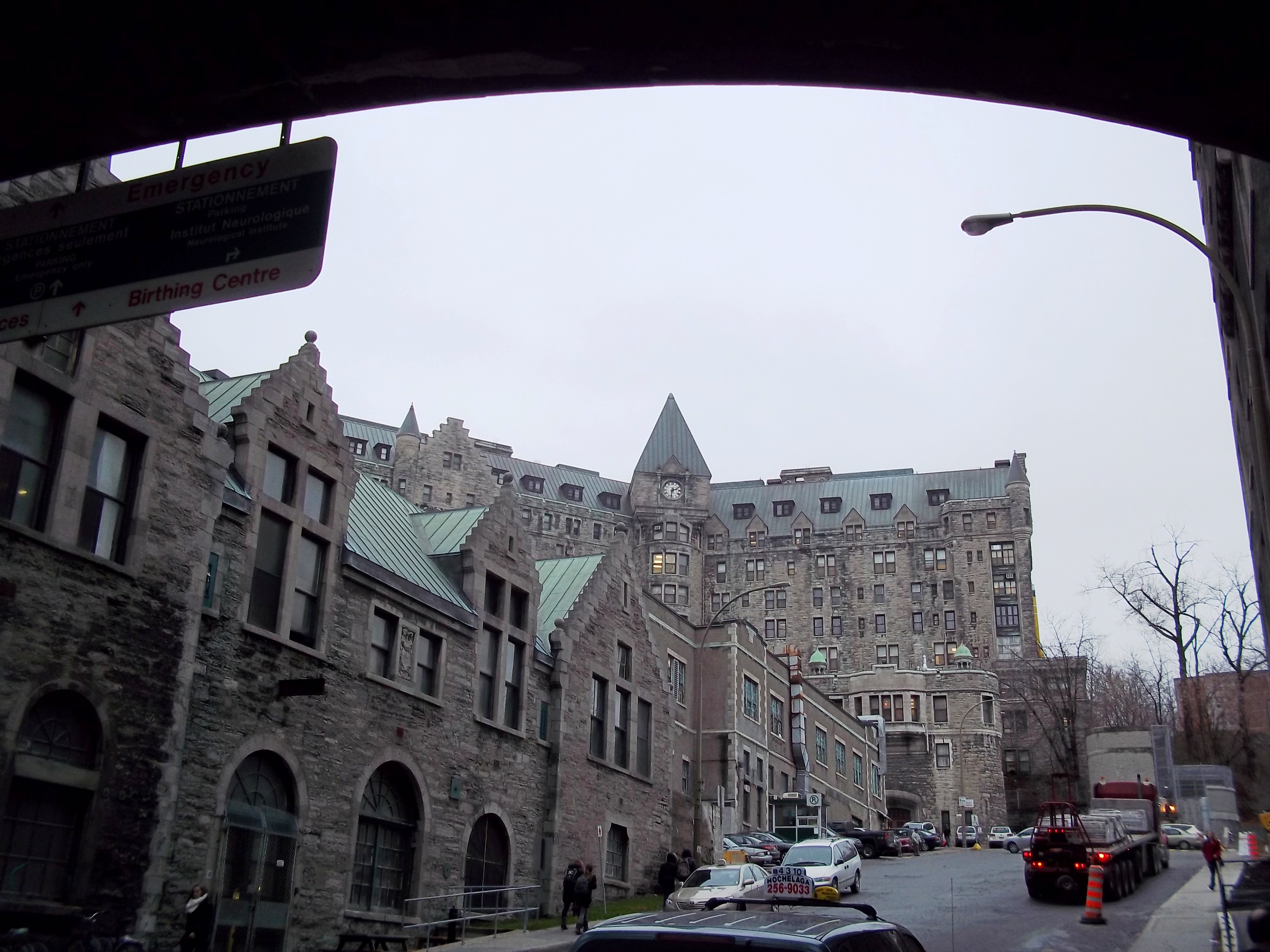 Hôpital Royal Victoria, 687, avenue des Pins Ouest, Montréal